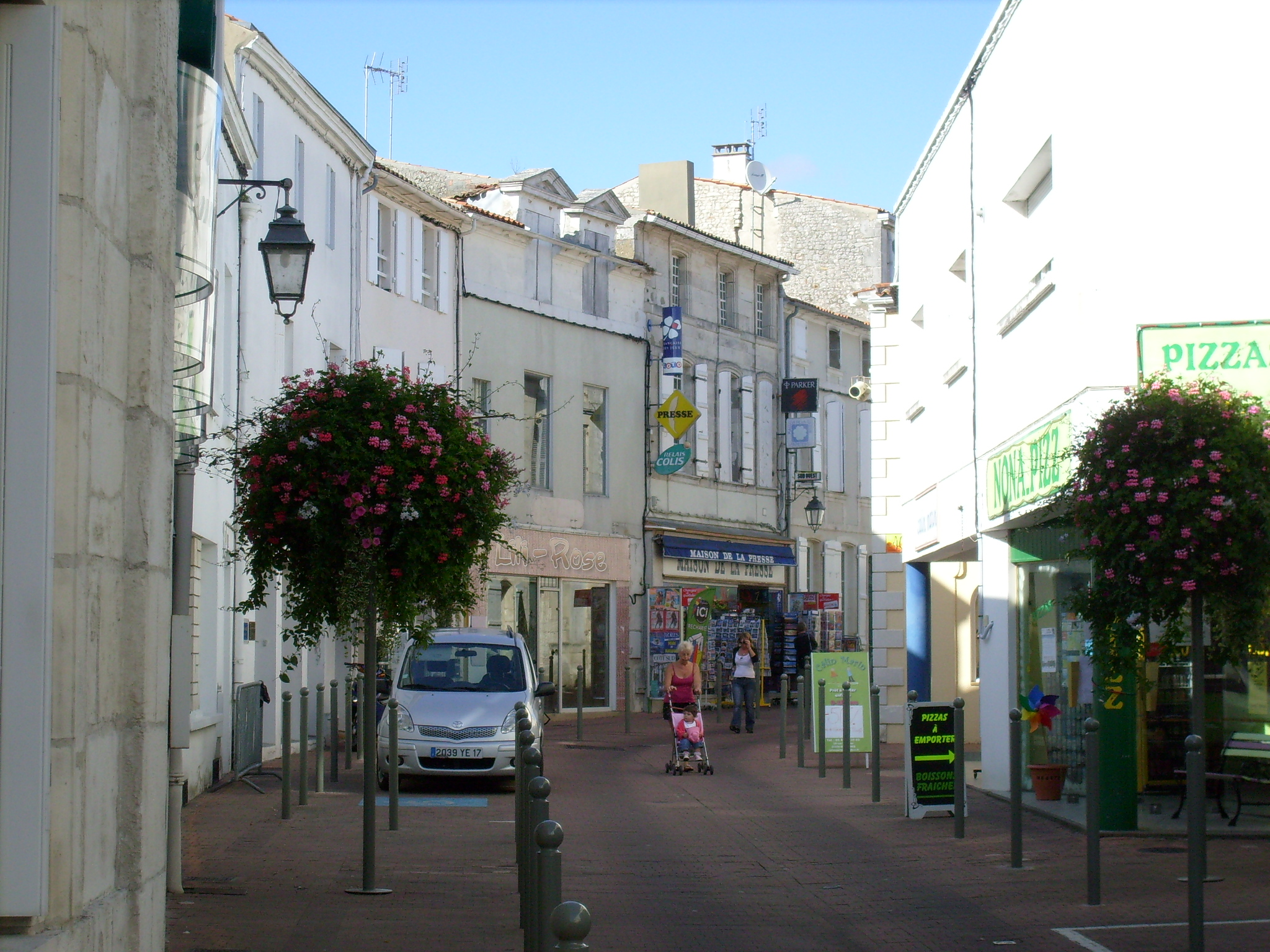 Secteur piétonnier de Marennes